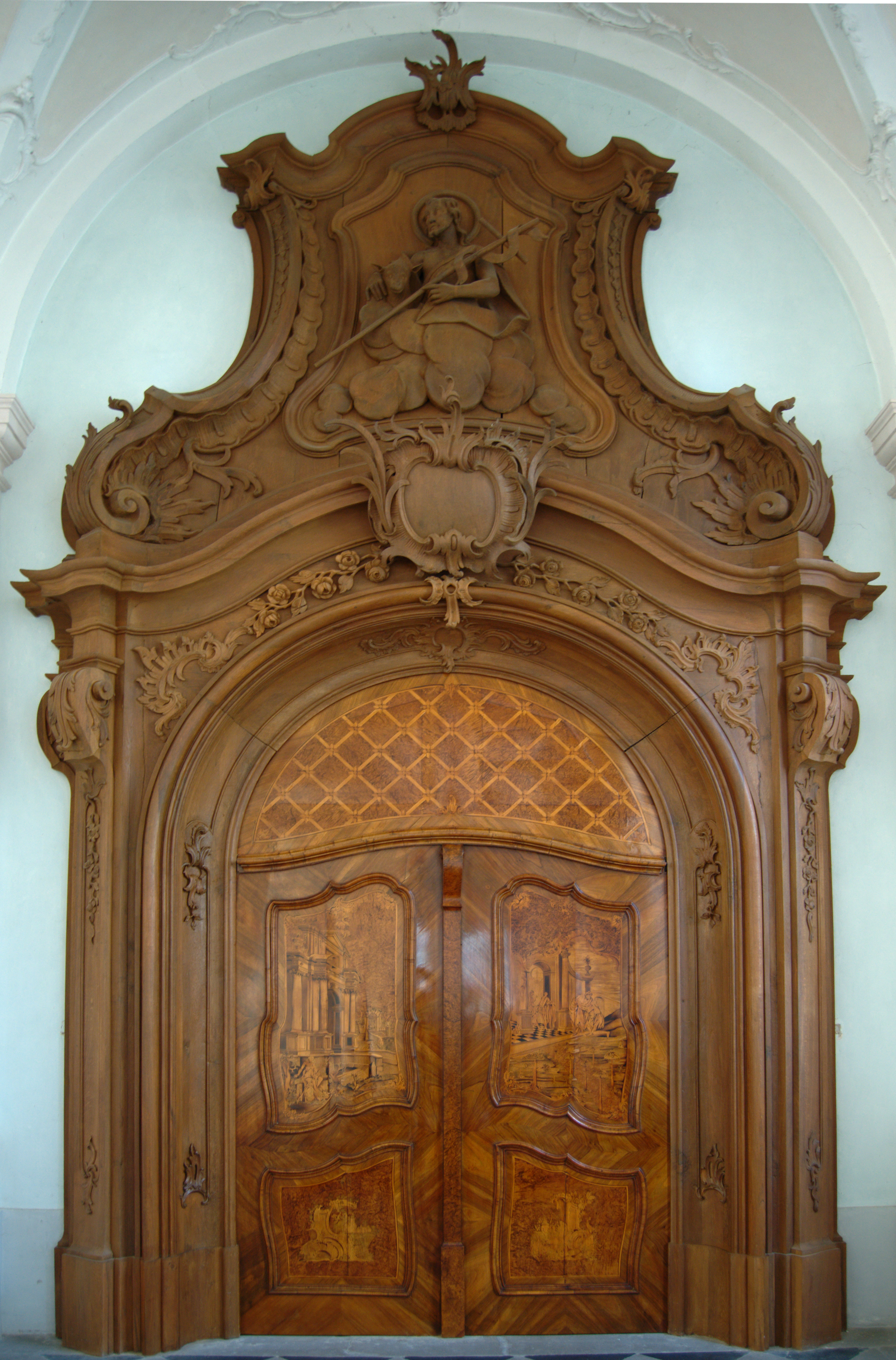 Scheintür im Nordflügel der Kirche Maria Immaculata Büren, Darstellung von Johannes dem Täufer und des Gleichnisses vom verlorenen Sohn